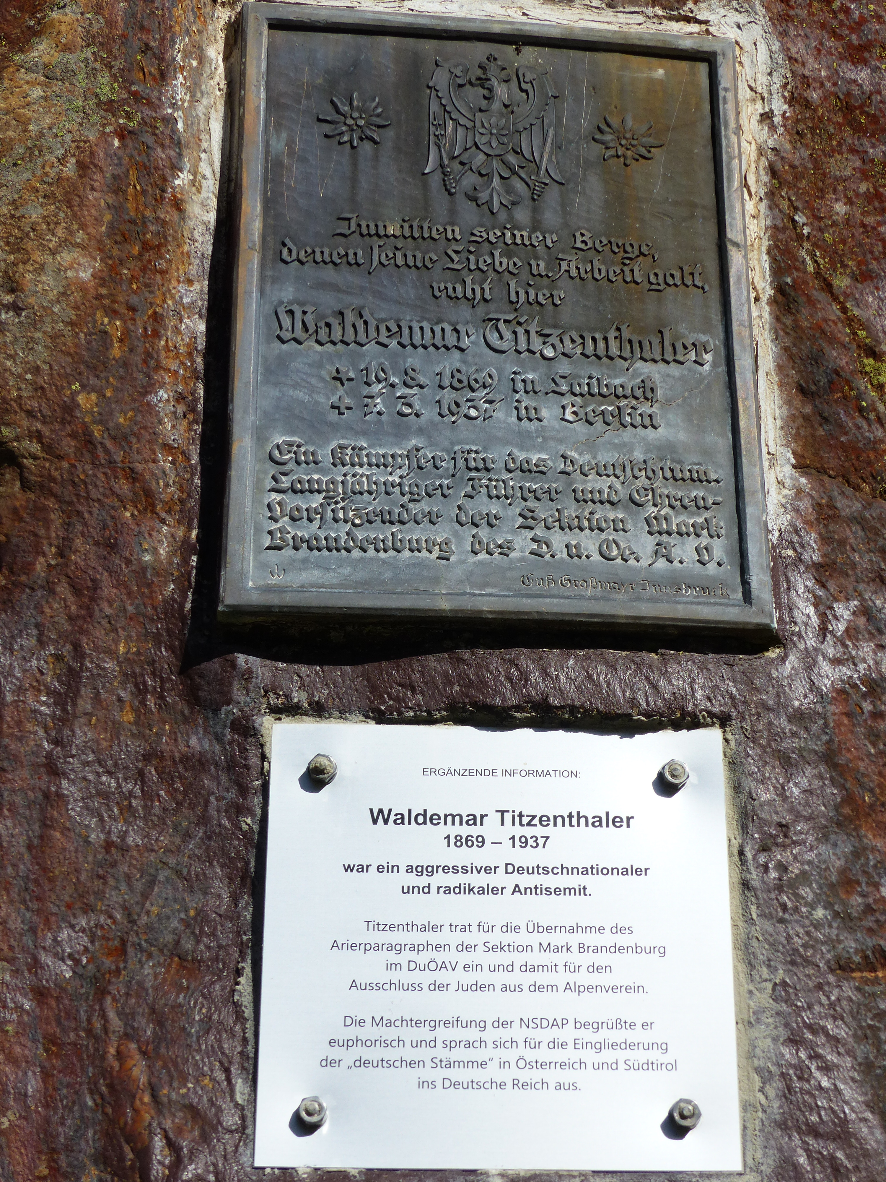 Titzenthaler-Grab oberhalb von Vent mit einer, nach einer Zerstörung erneut angebrachten, Info-Plakette